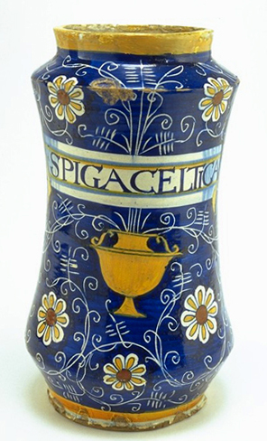 Albarello di Montelupo della metà del XVI secolo